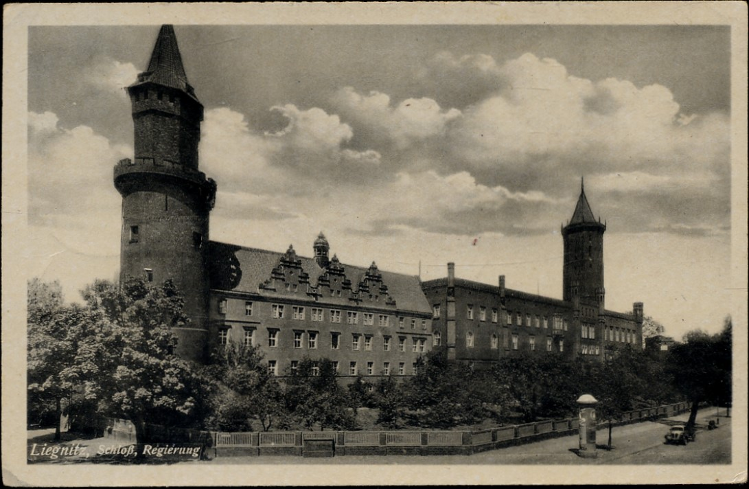 Regierung in Liegnitz